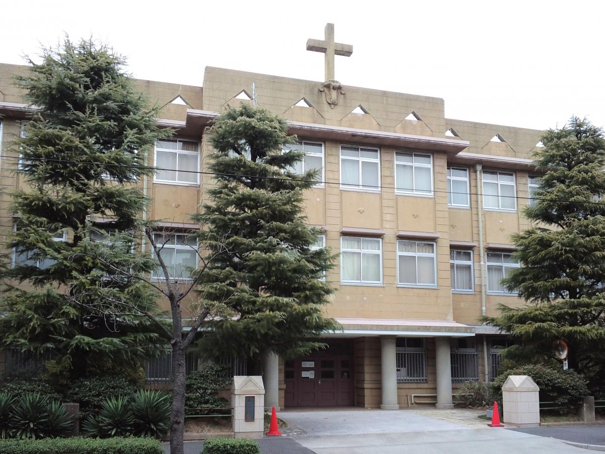 2015年頃ライネルス記念館